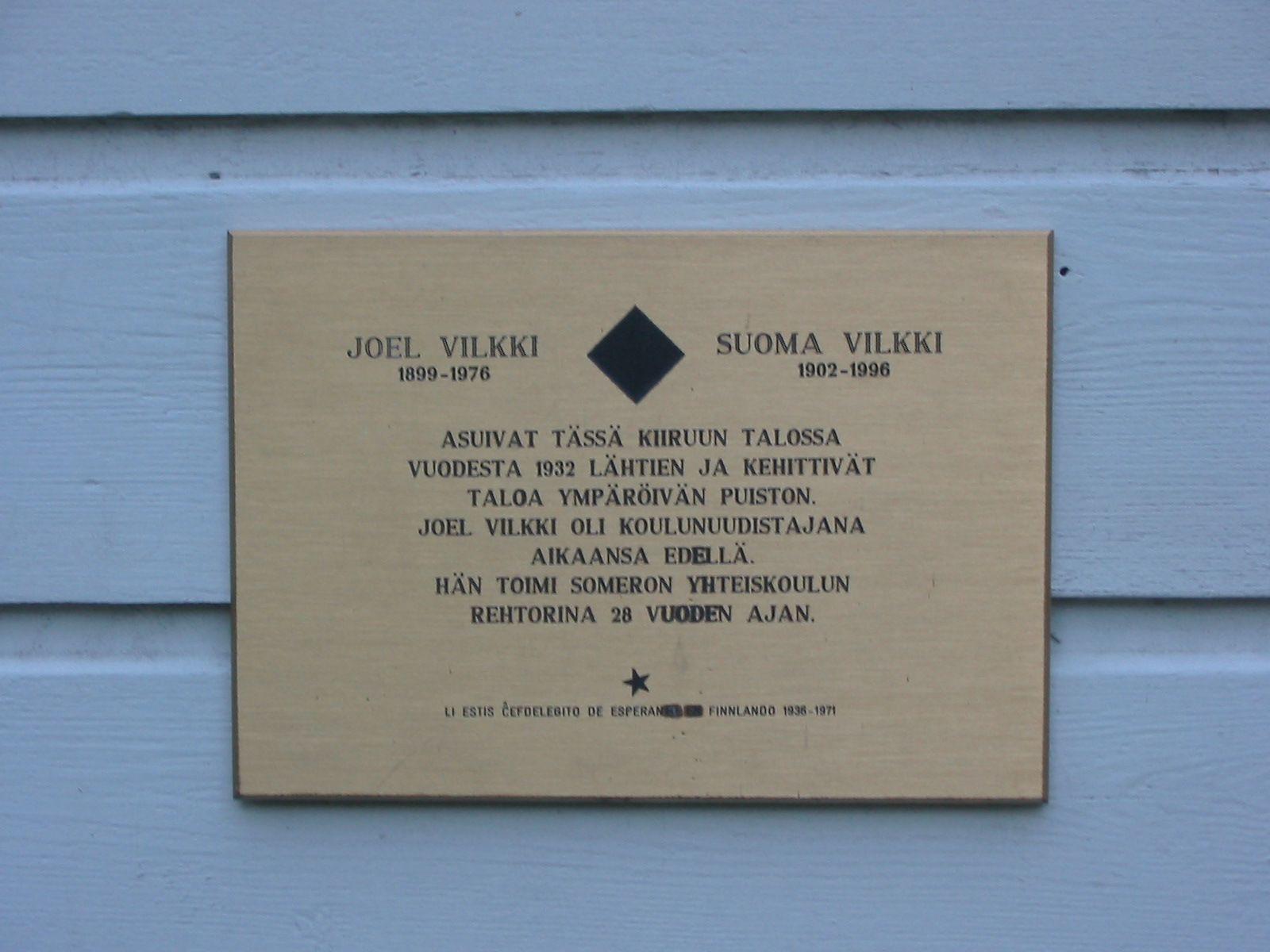 Joel Vilkin muistolaatta Kiiruun talossa Somerolla